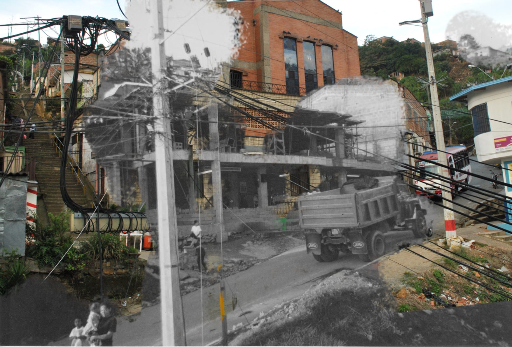 La construcción de este templo a comienzos de la década de los 90, ha sido vital en el desarrollo del barrio La Sierra. Esta foto es una propuesta para mostrar con una yuxtaposición lo nuevo y lo viejo, e Medellín